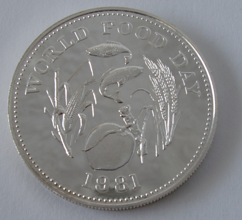 Philippines, 25 Piso, 1981, back, d=38 mm, 500/1000 silver